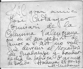 Carta del Tinent-coronel Manuel Ulibarri a Josep Castanyer